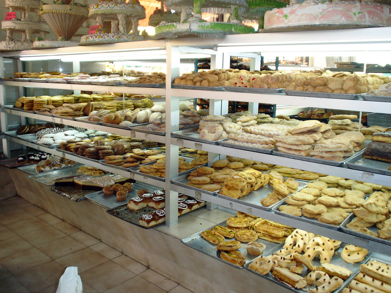 PANADERIA EN MEXICO